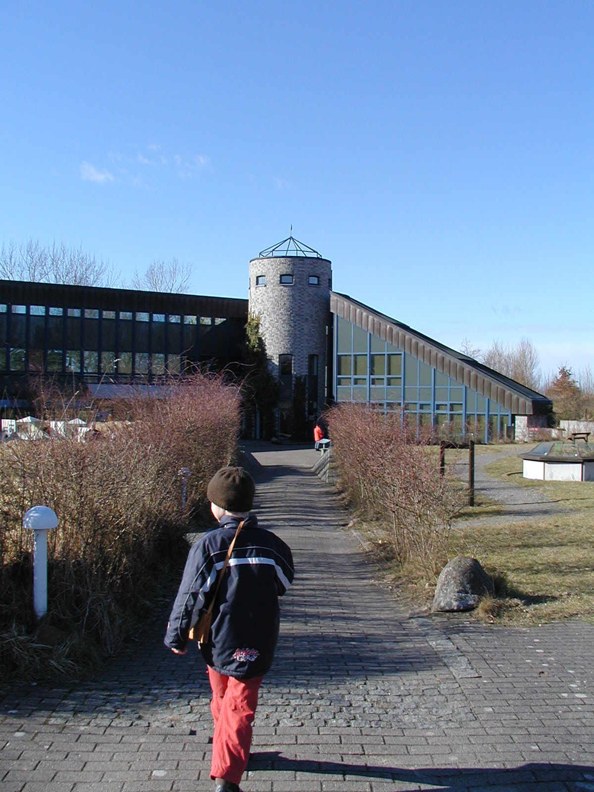 Das Natureum an der Niederelbe zwischen Balje und Neuhaus (Oste)